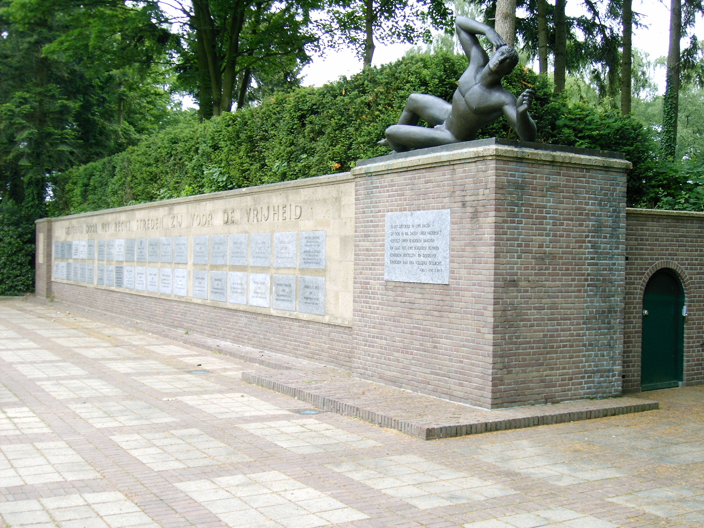 Ereveld Ede, MAUSOLEUM